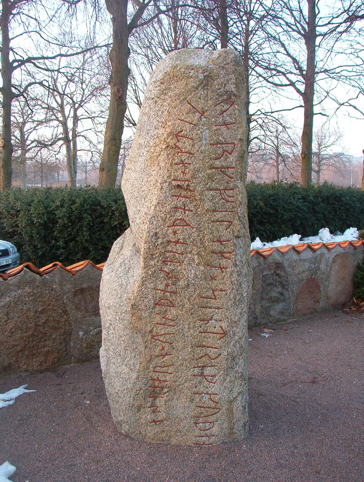 DR 262 (Fosiestenen) vid Fosie kyrka, Malmö.